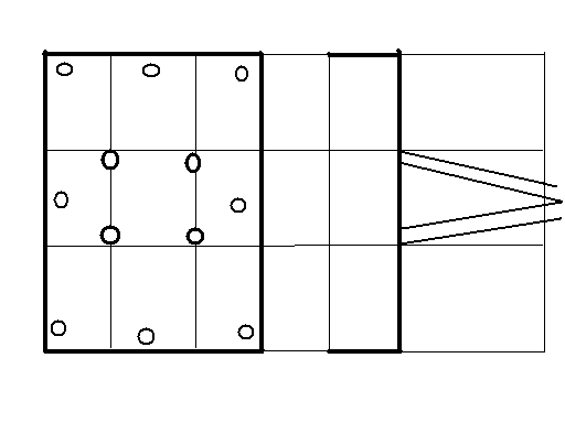 Einbruchschema.